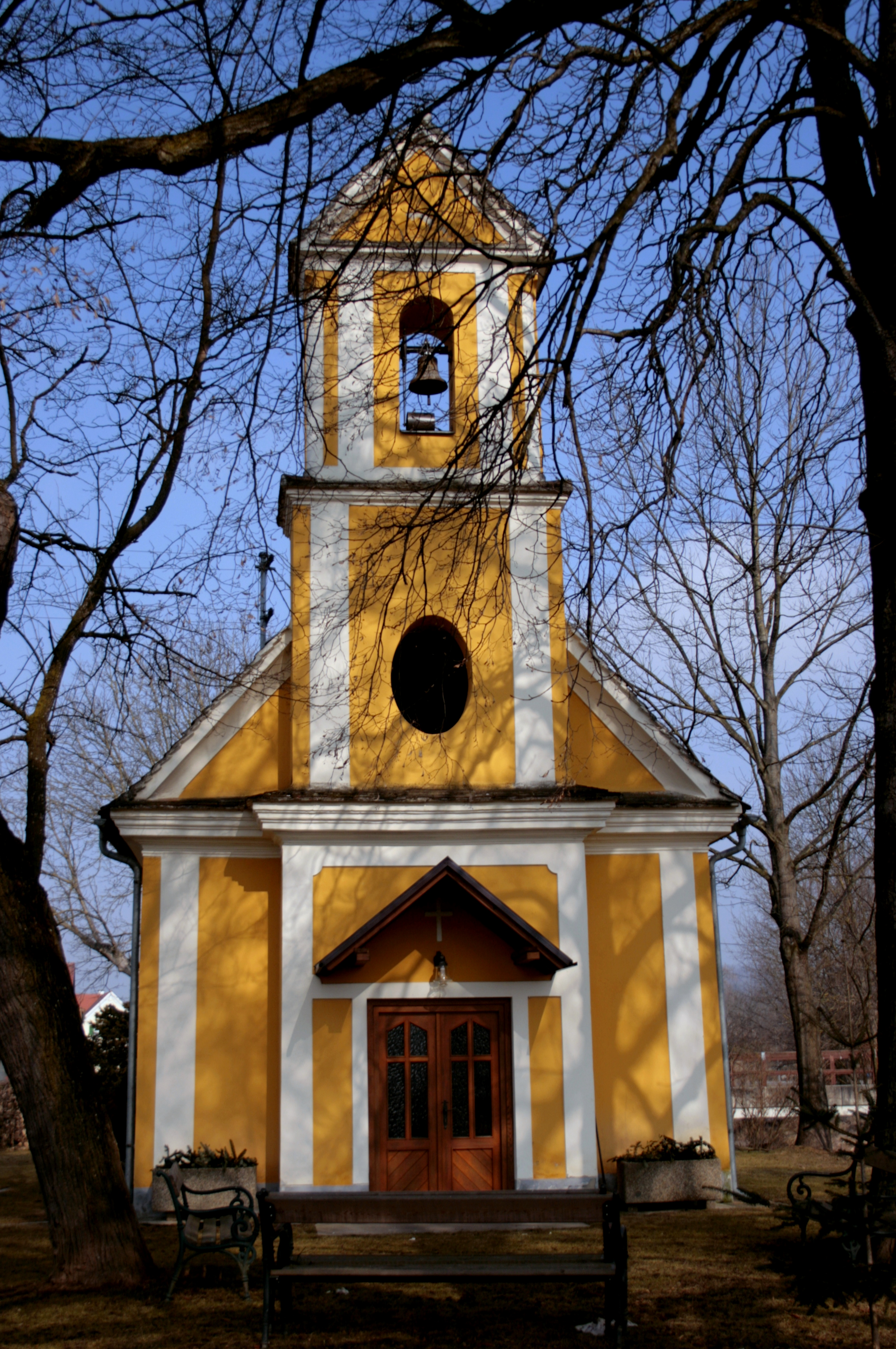 Oberlungitz Ortskapelle